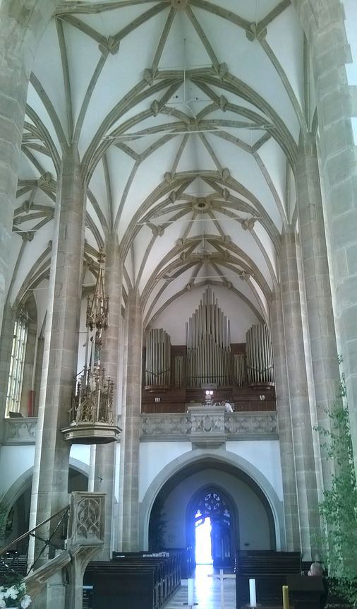 Klenba